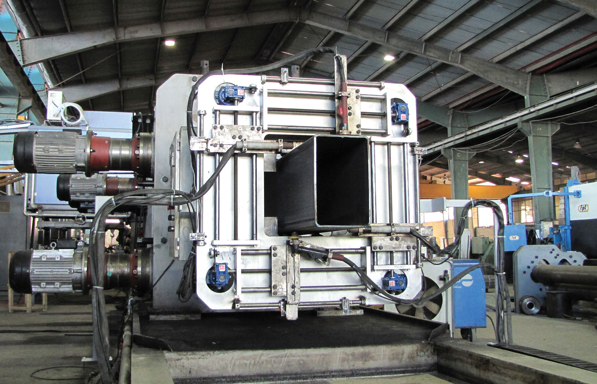 روش تولید مستقیم مقاطع ساختمانی توخالی در صنایع فولادماشین، استفاده گسترده در سوله سازی، اسکلت فلزی و کاربردهای مختلف دیگر